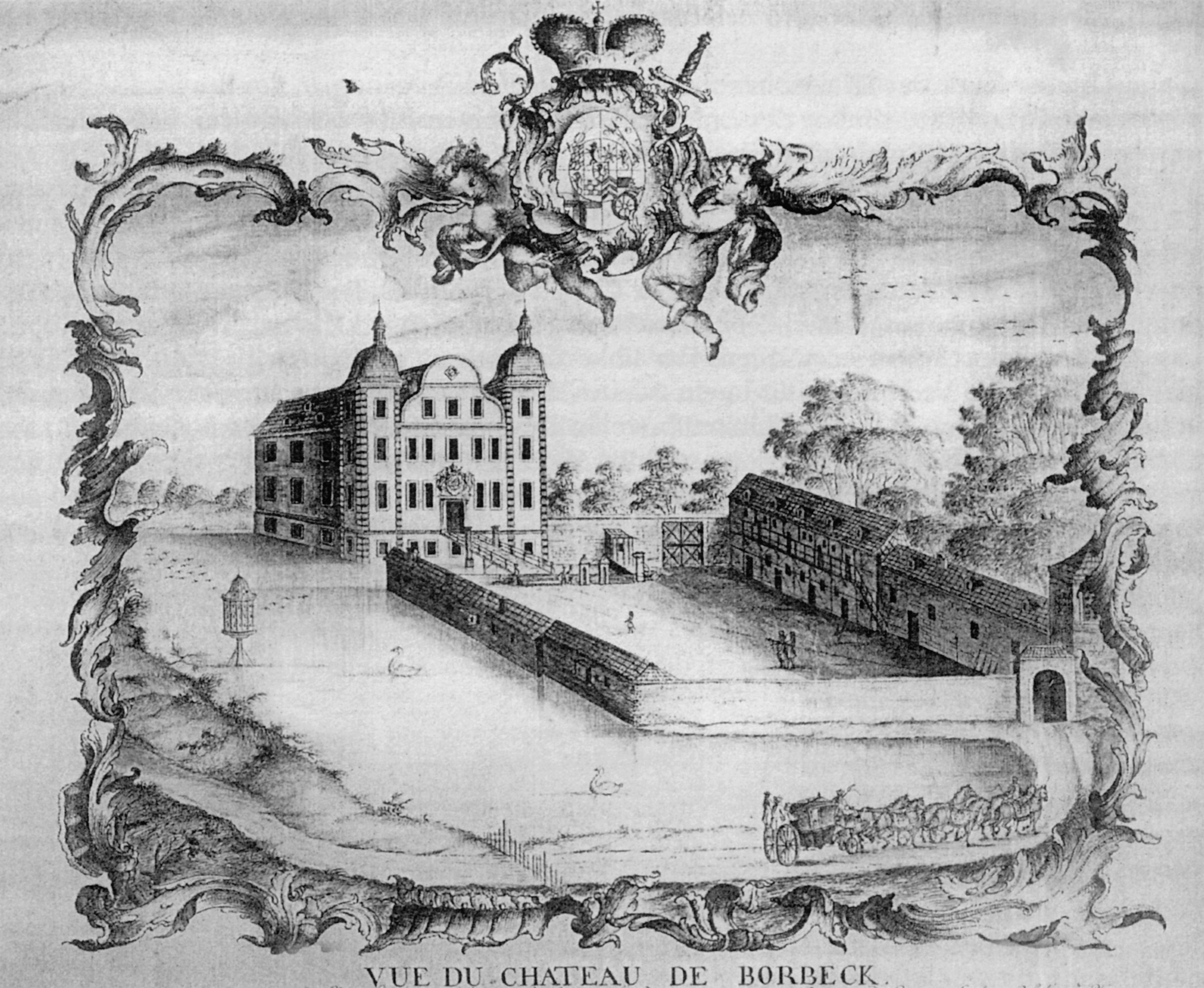 Kupferstich mit einer Abbildung des Schlosses Borbeck in Essen